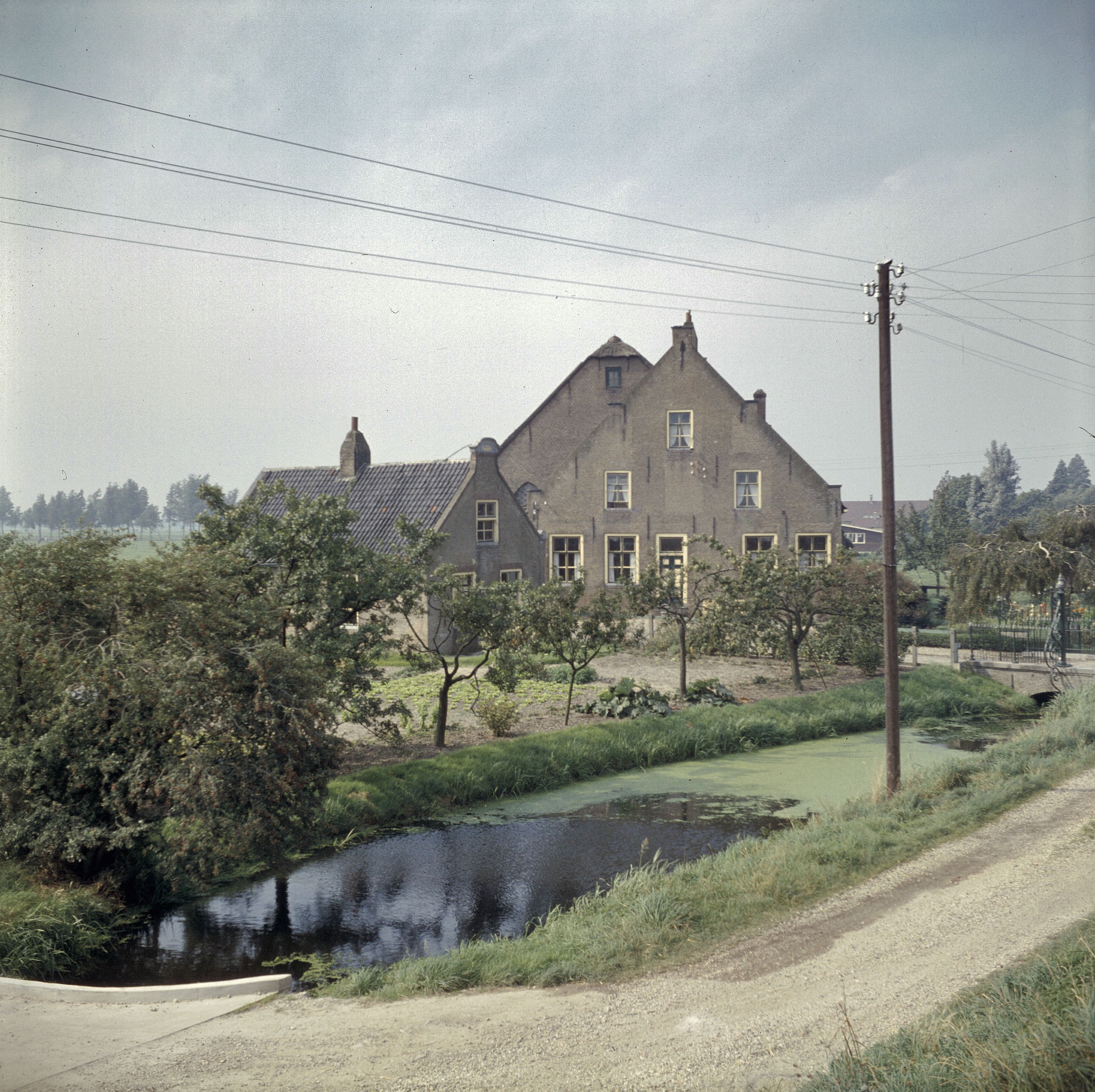 Boerderij Oost Leeuwenstein: Zicht op de voorgevel van de boerderij en het zomerhuis